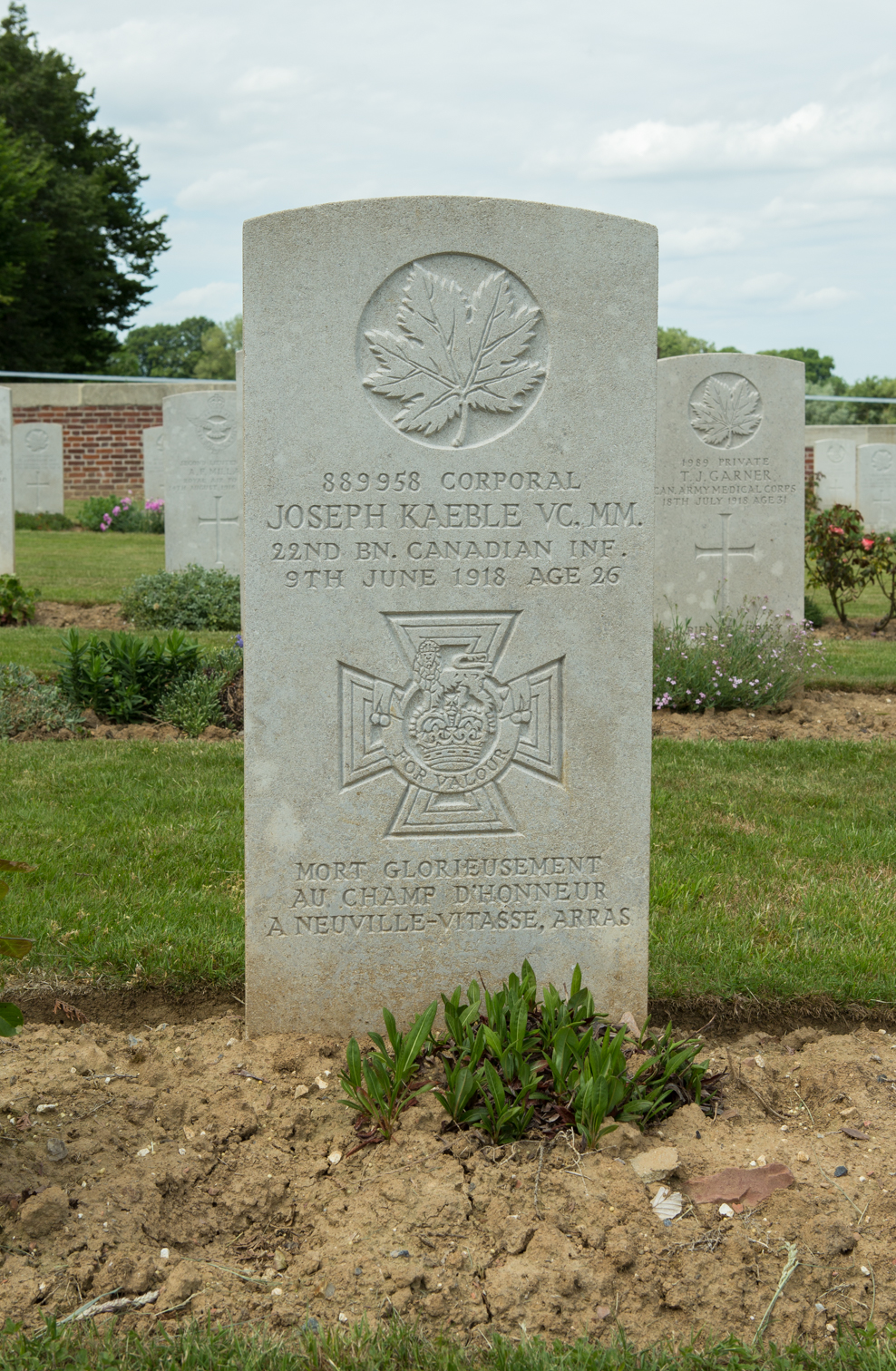 Wanquetin Communal Cemetery Extension. Joseph Kaeble VC.